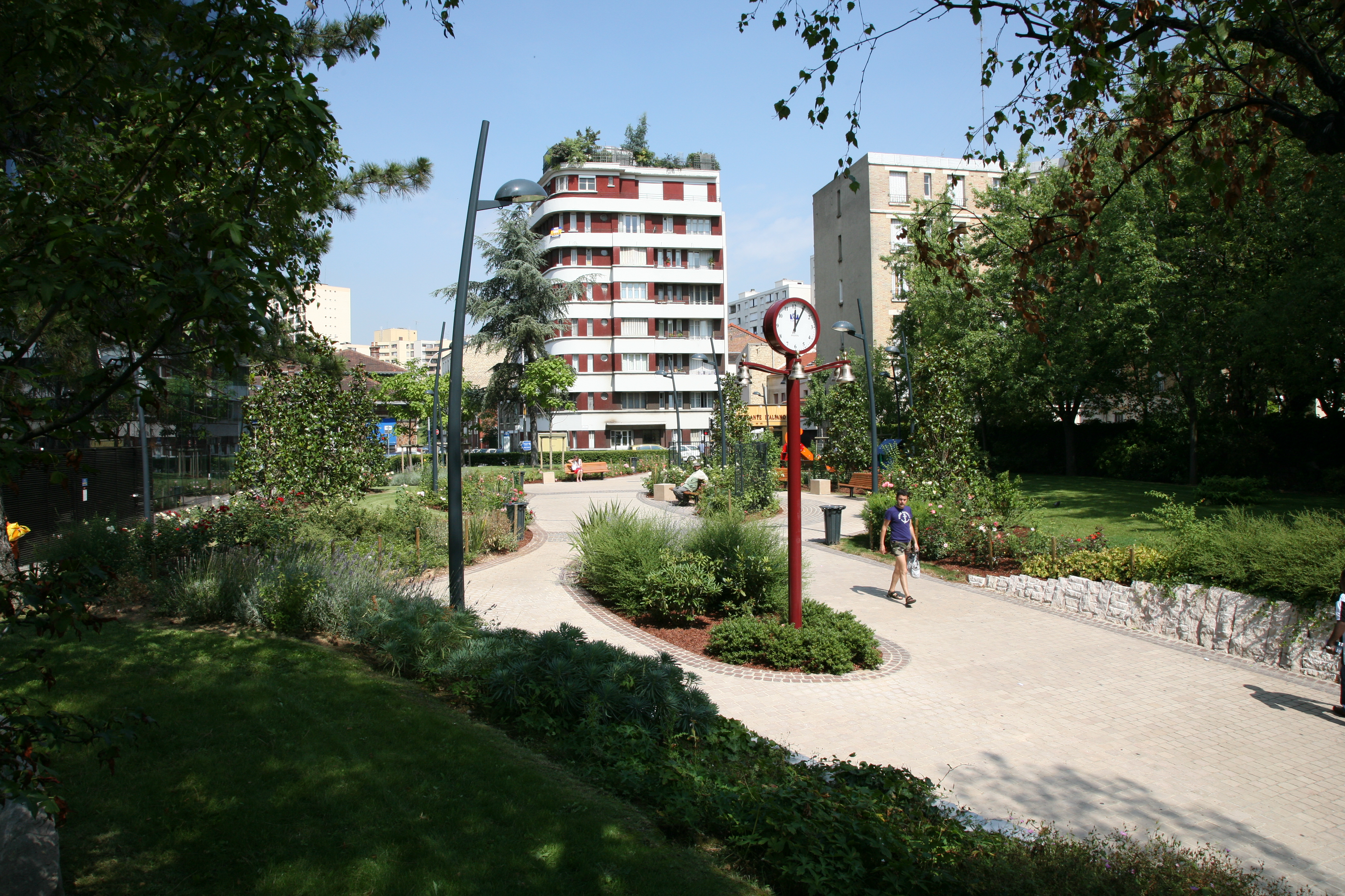 Square du 11 novembre 1918 à Vanves